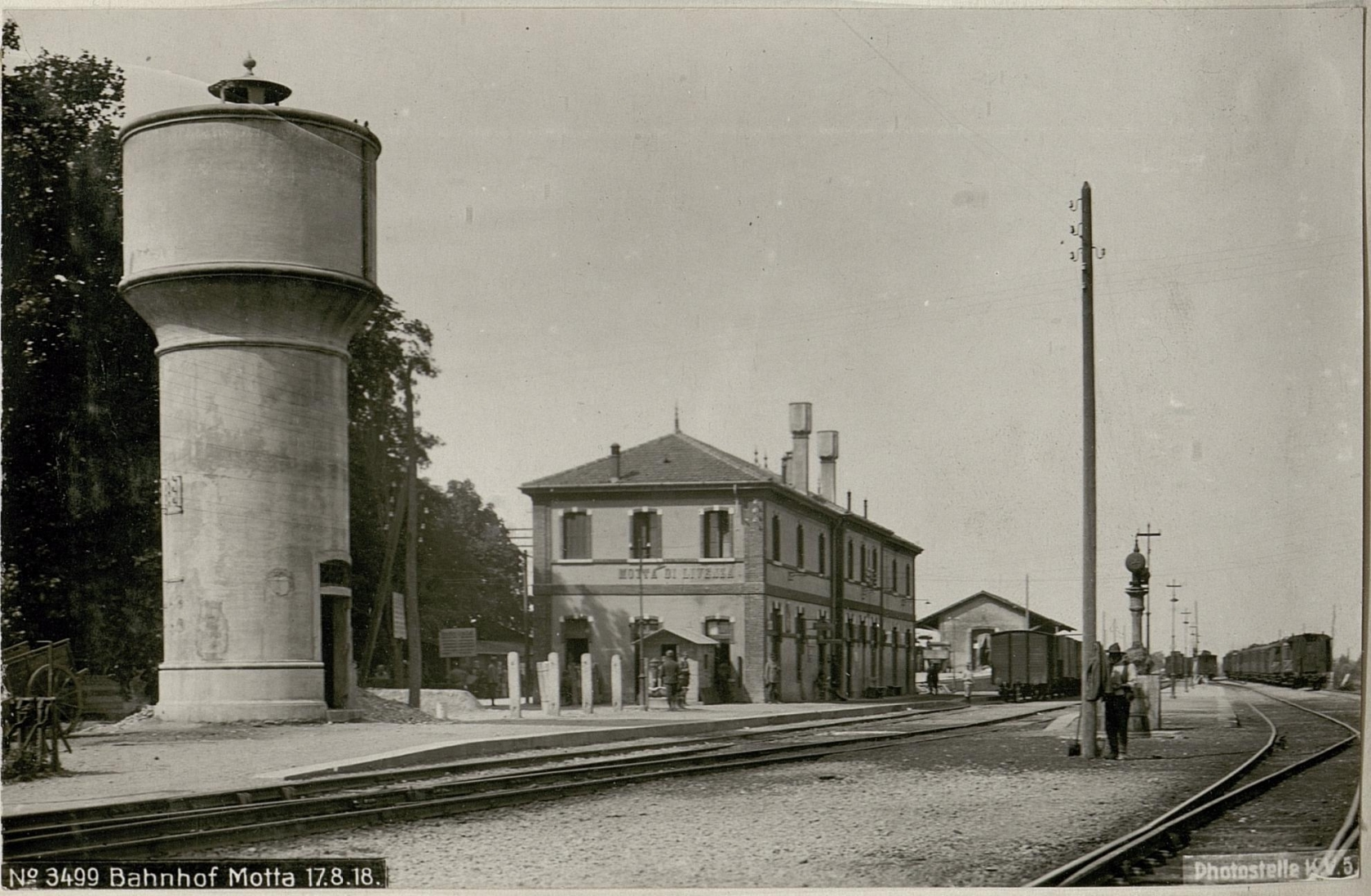 Stazione di Motta di Livenza in una foto d'epoca